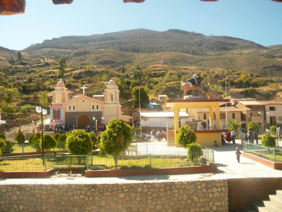 DISTRITO DE CARHUANCA - PROVINCIA VILCASHUAMÁN - REGIÓN AYACUCHO - PERÚ